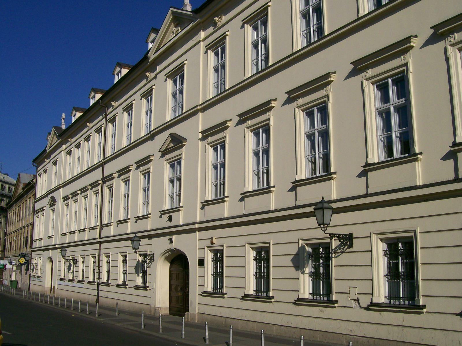 Katolički bogoslovni fakultet Zagreb